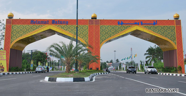 Gerbang Bandara International Sultan Syarif Kasim II